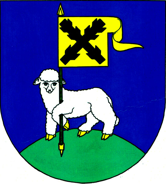 Znak obce Liběšice (okres Litoměřice)